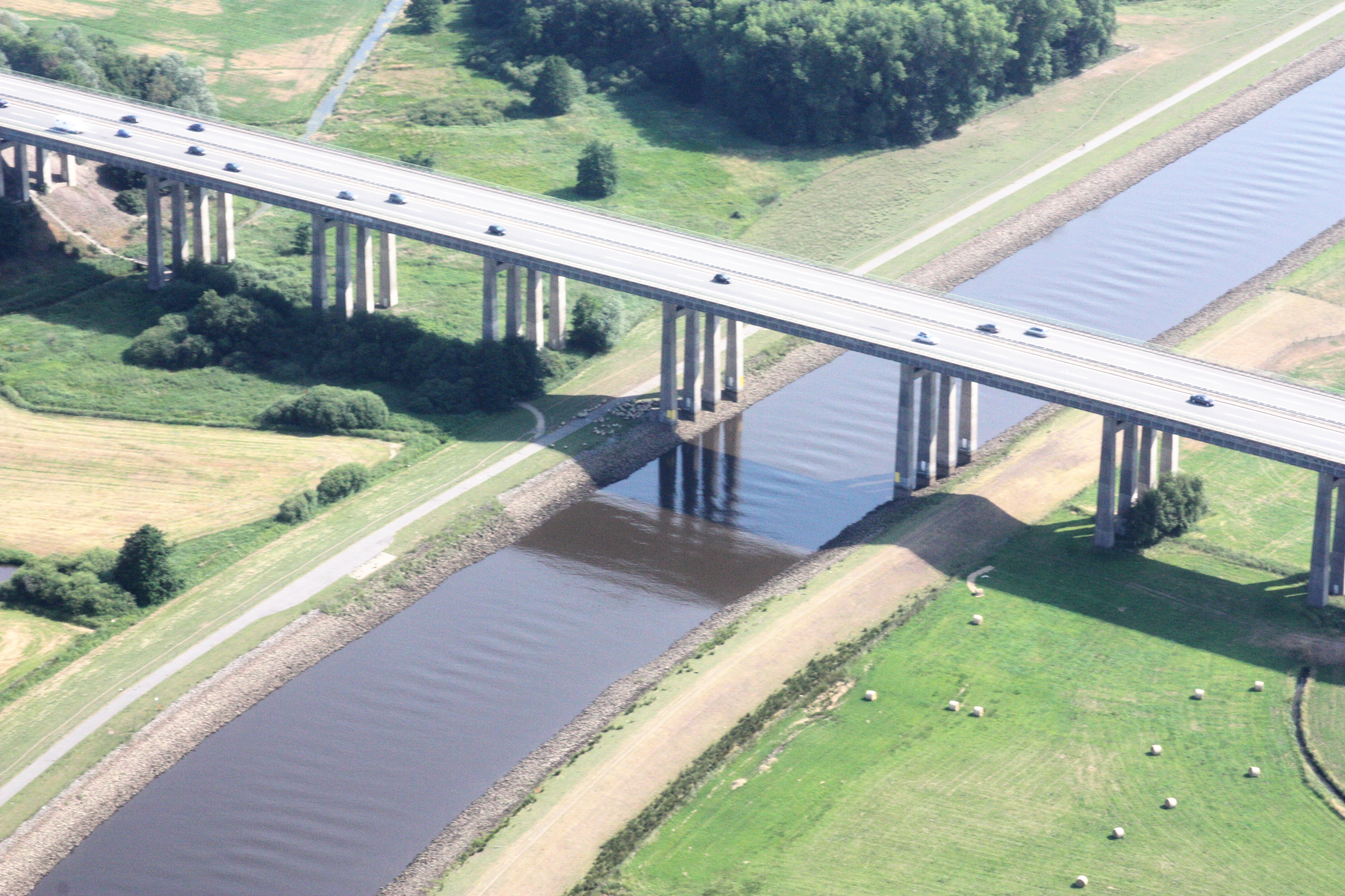 Huntebrücke über die Bundesautobahn 29.Luftaufnahmen Oldenburg (Oldenburg), mit Weiterflug nach Westen; 1500 Fuß Flughöhe; Juli 2010; Originalfoto bearbeitet: Tonwertkorrektur und Bild geschärft mit Hochpassfilter